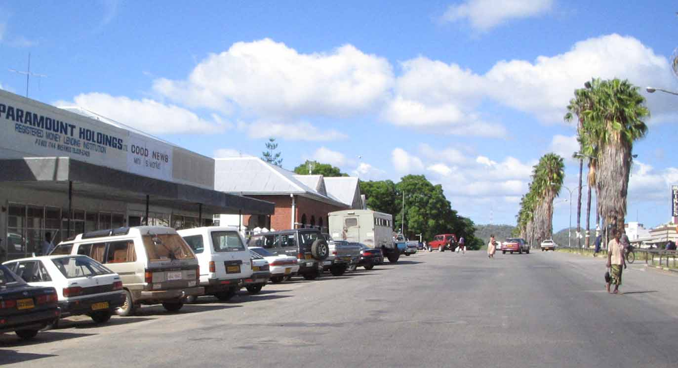 Машвинго, главни град Провинције Машвинго, Снимљено 21 марта 2005, Аутор Радован Корда